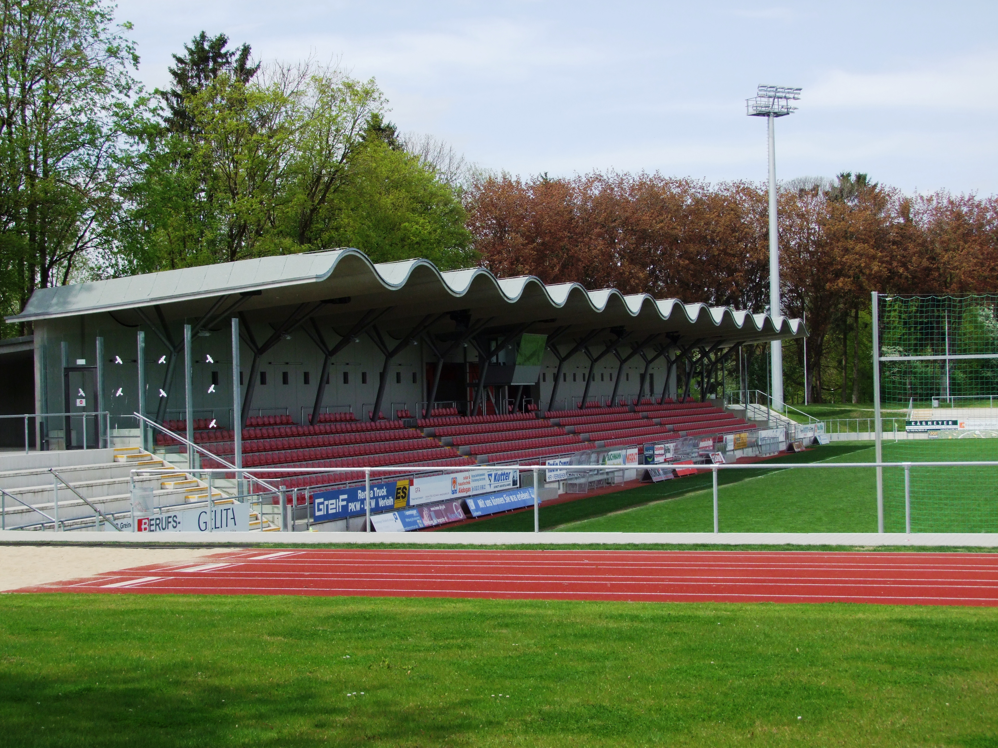 Die 2008 eröffnete Fußballarena des Bayernligisten FC Memmingen und des BSC Memmingen im Memminger Süden.